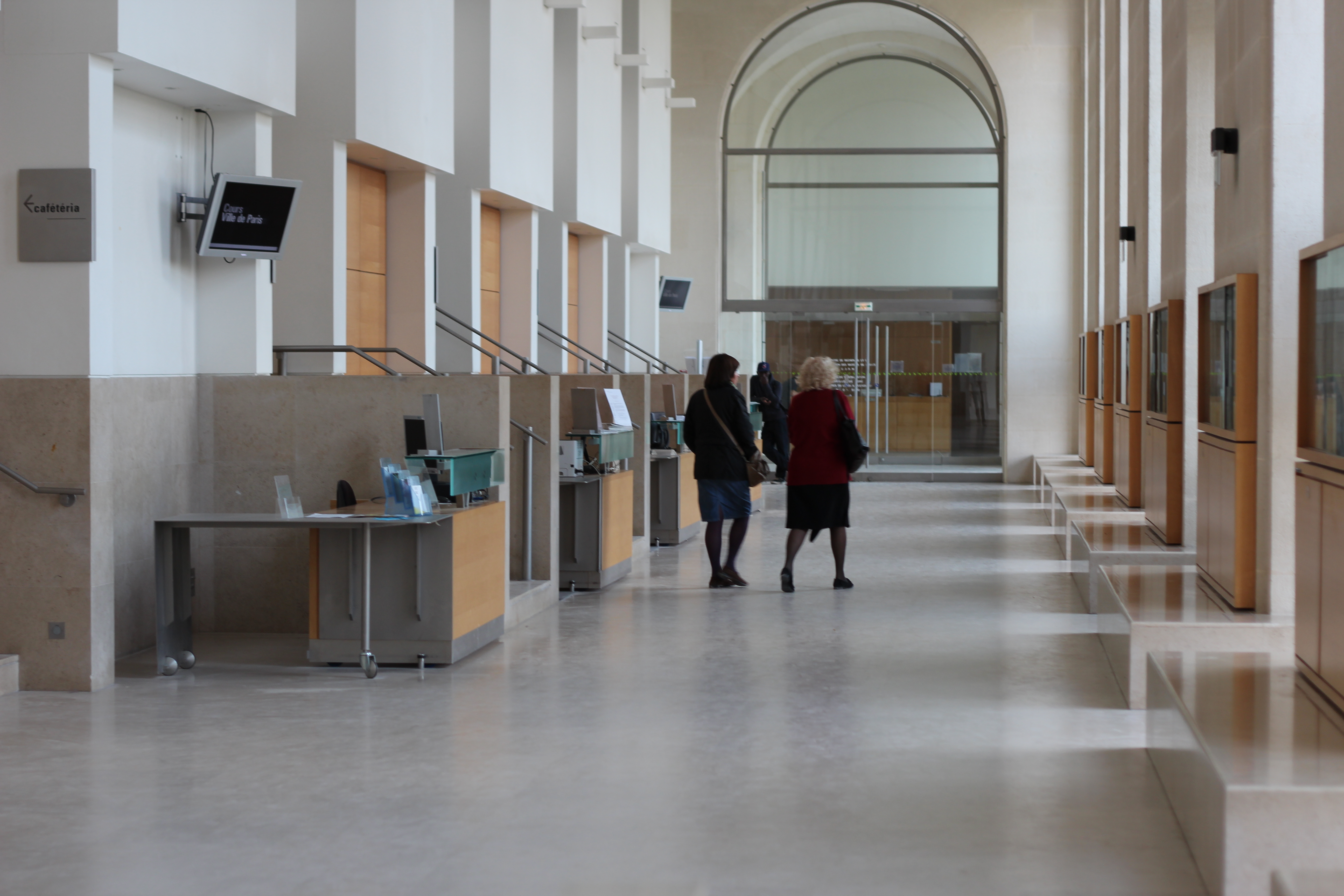 Grand Hall de l'Ecole du Louvre, au rez-de-chaussée de l'aile de Flore